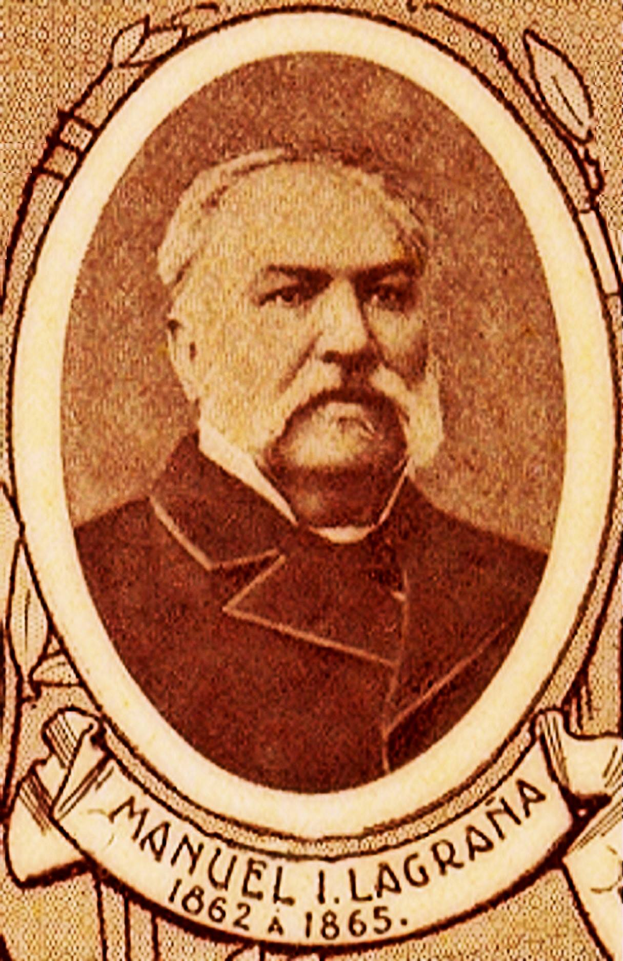 Gobernador Manuel Ignacio Lagraña (Corrientes, febrero de 1821 – Buenos Aires, febrero de 1882)